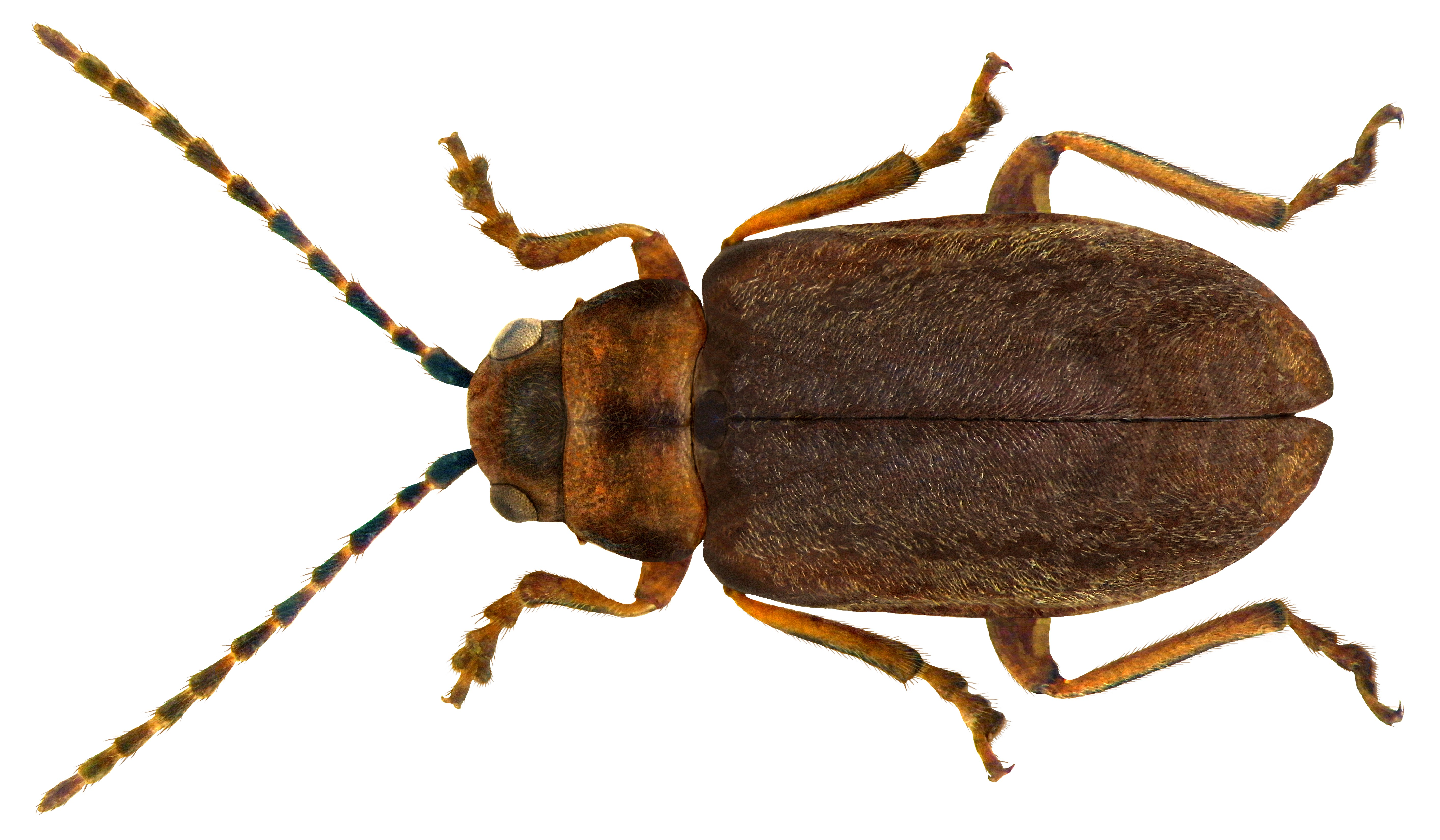 Pyrrhalta viburni (Paykull, 1799) Familie: Chrysomelidae Groesse: 4,5-6,5 mm Verbreitung: Mitteleuropa bis südliches Nordeuropa Oekologie; an Viburnum Fundort: Germania, Bayern, Oberpfalz, Michelfeld/Auerbach, Flembachtal leg.det. G.Uhmann, 1971 Photo: U.Schmidt, 2011